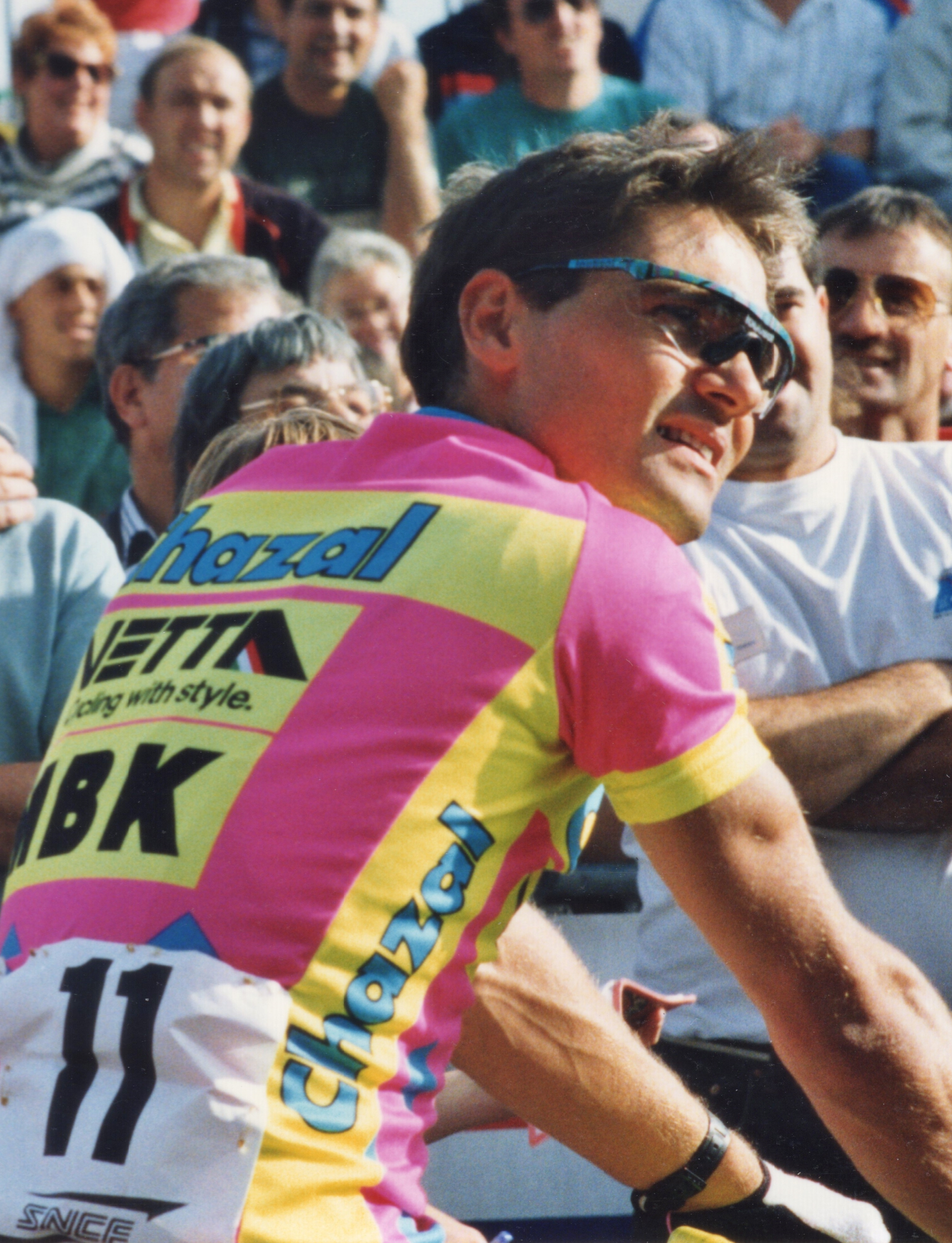 Thierry Marie et René Foucachon au Critérium de Lèves 1993